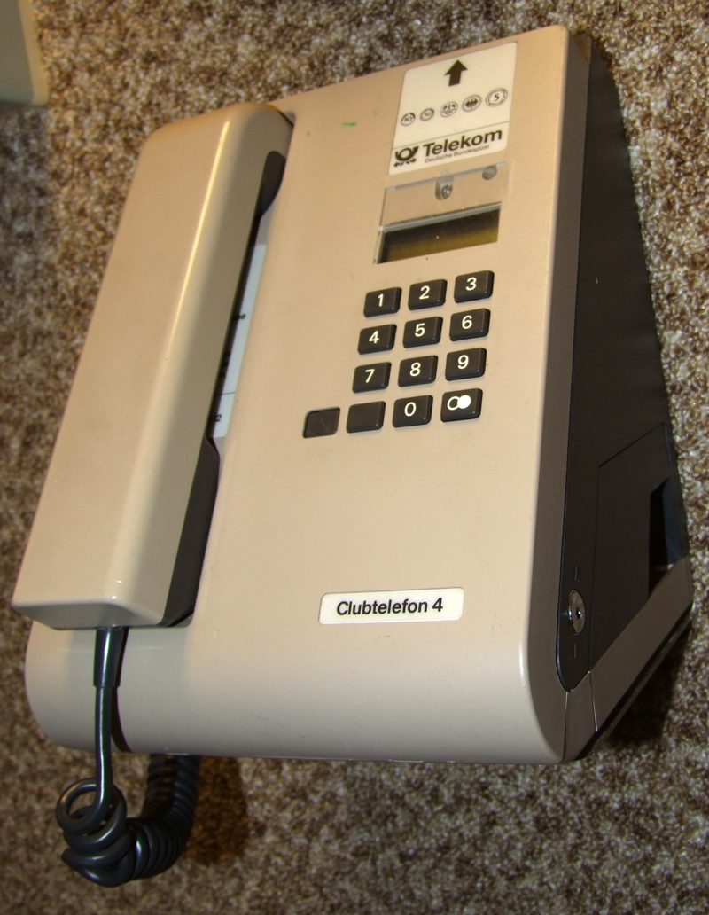 Clubtelefon 4